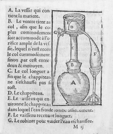 Alambic pour extraire l'huile des racines, herbes, semences et choses aromatiques, « Quatre livres des secrets de médecine et de la philosophie chimique » Jean Liebault